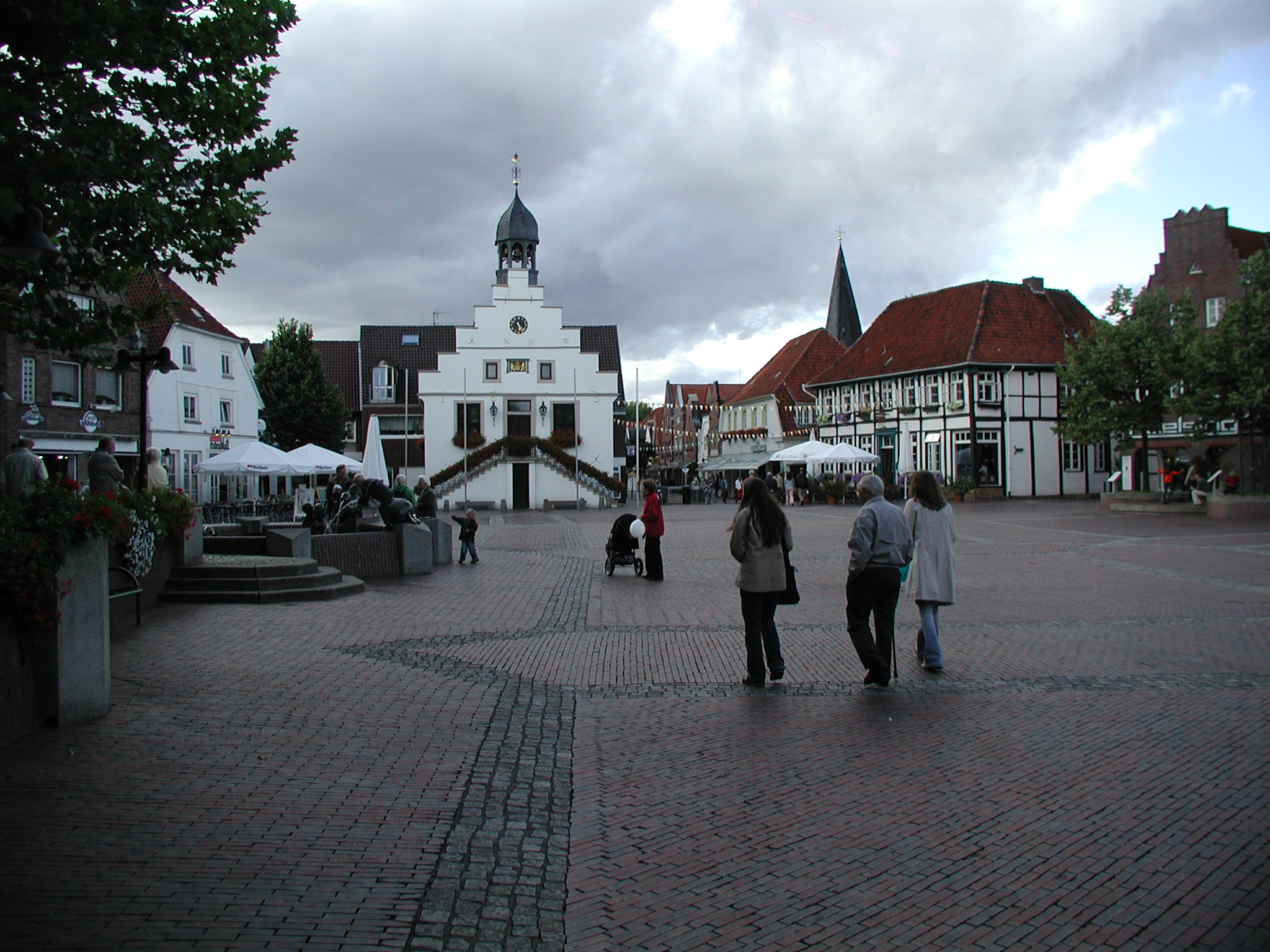 Emsland - Lingen - Markt